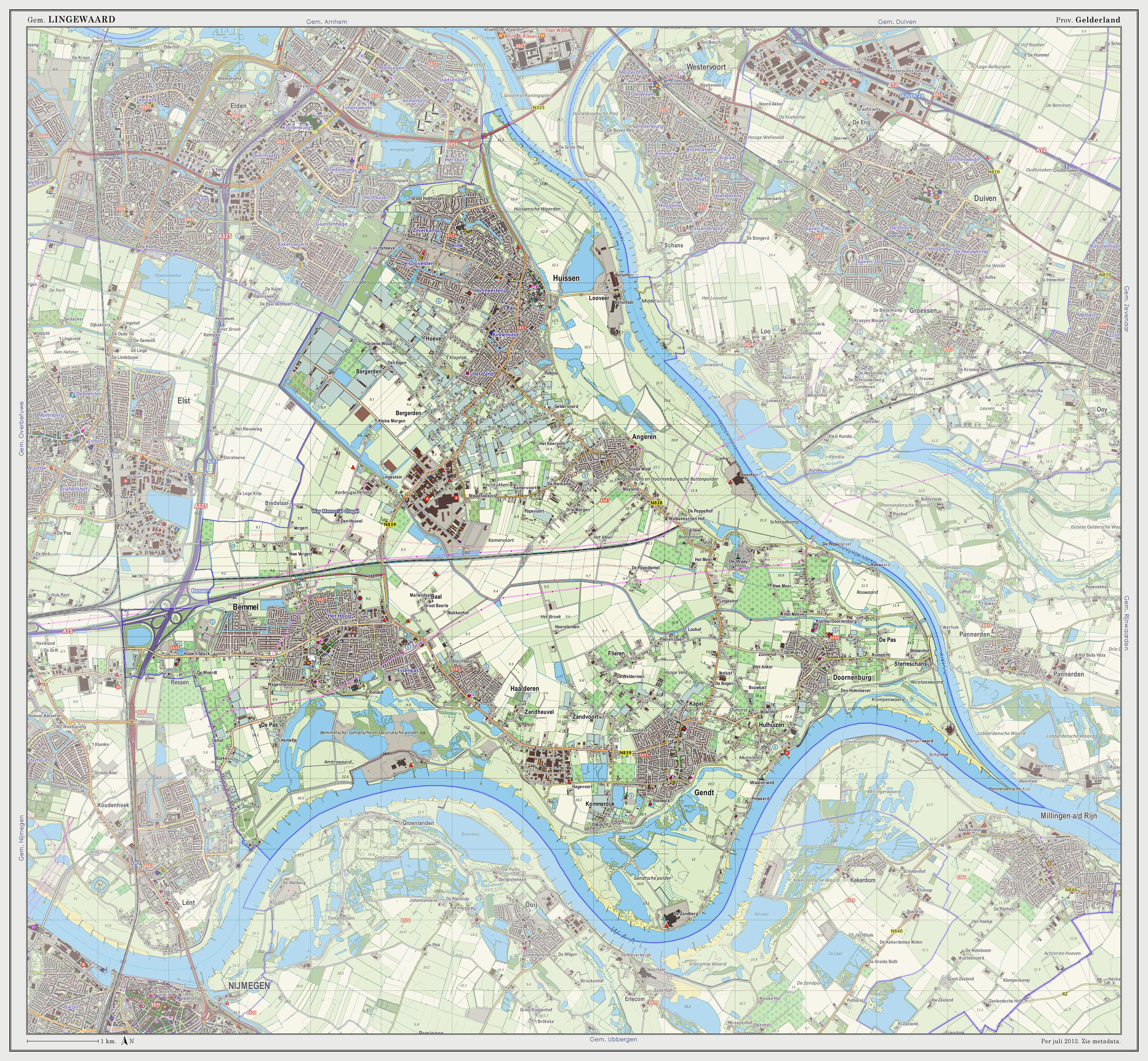 Topografische kaart van gemeente Lingewaard (2013). Samengesteld door Jan-Willem van Aalst op basis van de GML open geodata van de BRT/Top10NL (basisregistratie Topografie, Kadaster 2011), vrijgegeven door Kadaster onder de Creative Commons BY licentie. Additionele gegevens uit BAG (8 juli 2013), uit de Open Street Map (9 juli 2013) en uit de Risicokaart. Peildatum kaartbeeld: 9 juli 2013. Zie ook Gemeentenatlas.nl Samenstelling en kleurenschema: Jan-Willem van Aalst, met QuantumGIS en Photoshop. Zie ook de Legenda.